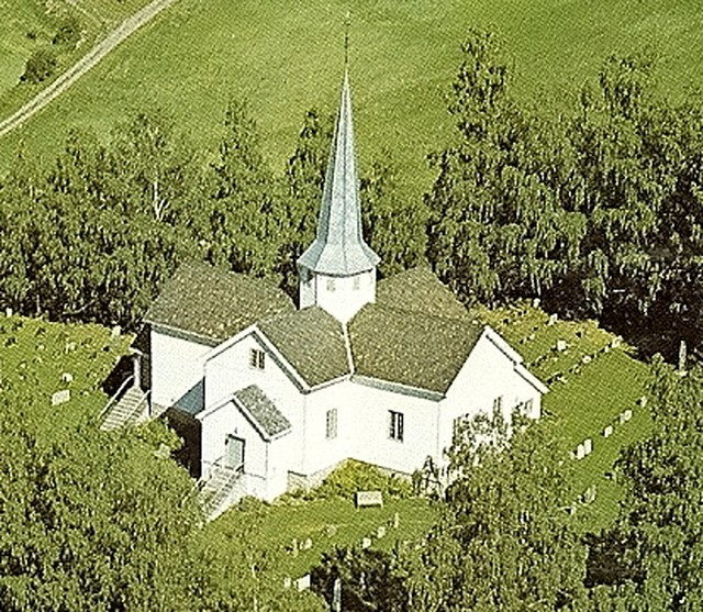 Øyer kirke